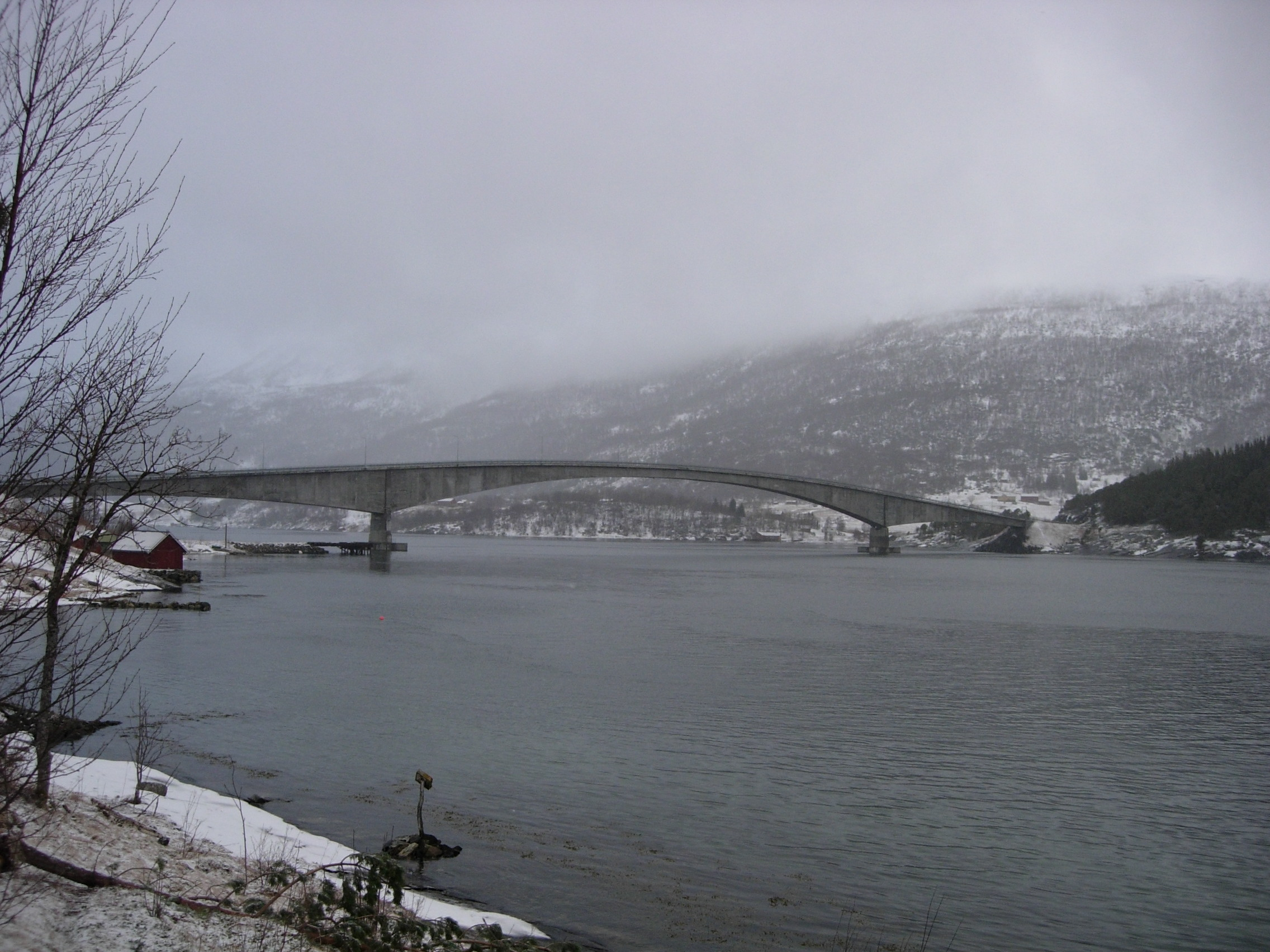 Støvset bru, Støvset brige